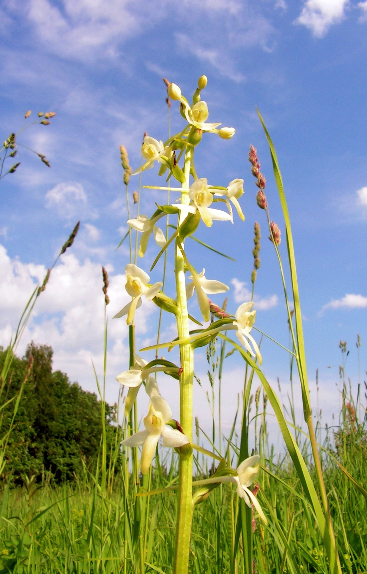 Platanthera bifolia. Moscow region, Russia.